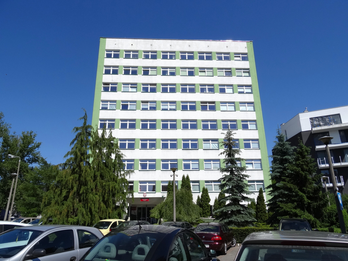 Biurowiec przy ul. Wyczólkowskiego 22 w Bydgoszczy, mieści oddział regionalny KRUS (Kasa Rolniczego Ubezpieczenia Społecznego)